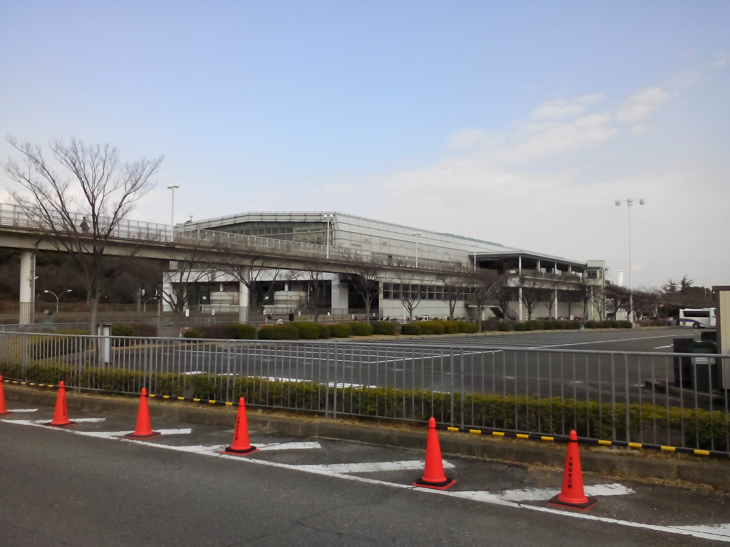 万博公園中央駐車場から望む大阪の万博記念公園駅駅の様子。投稿者本人の撮影。